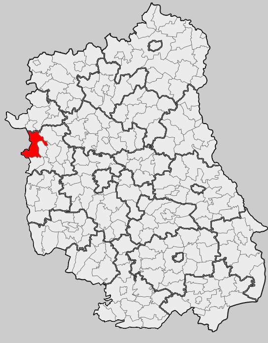 Map of gmina Puławy (rural), Puławy county, Lublin voivodship Mapa gminy Puławy (wiejska), powiat puławski, województwo lubelskie